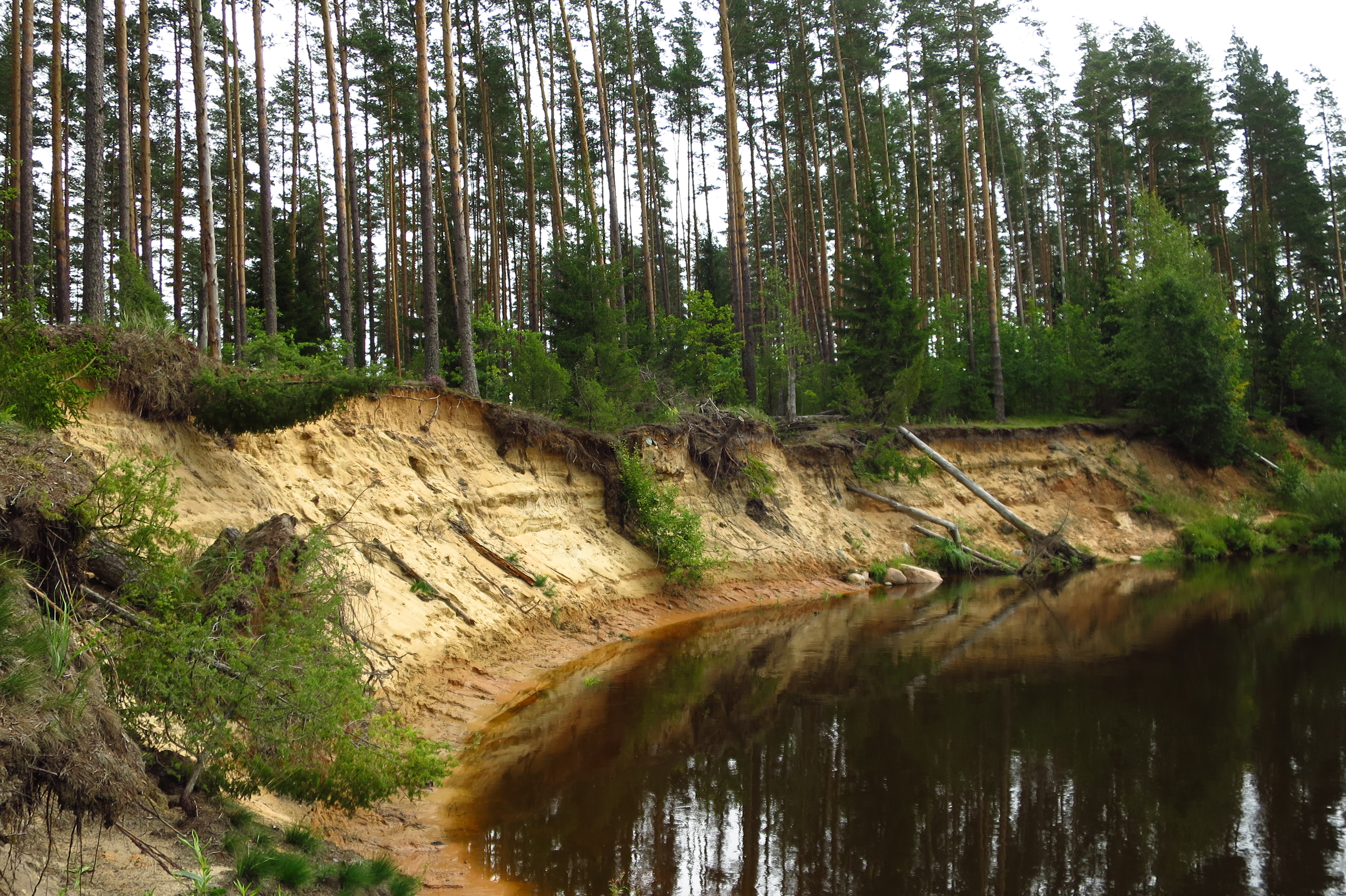 Valgemägi Mustjõe ääres Koiva-Mustjõe MKA-l